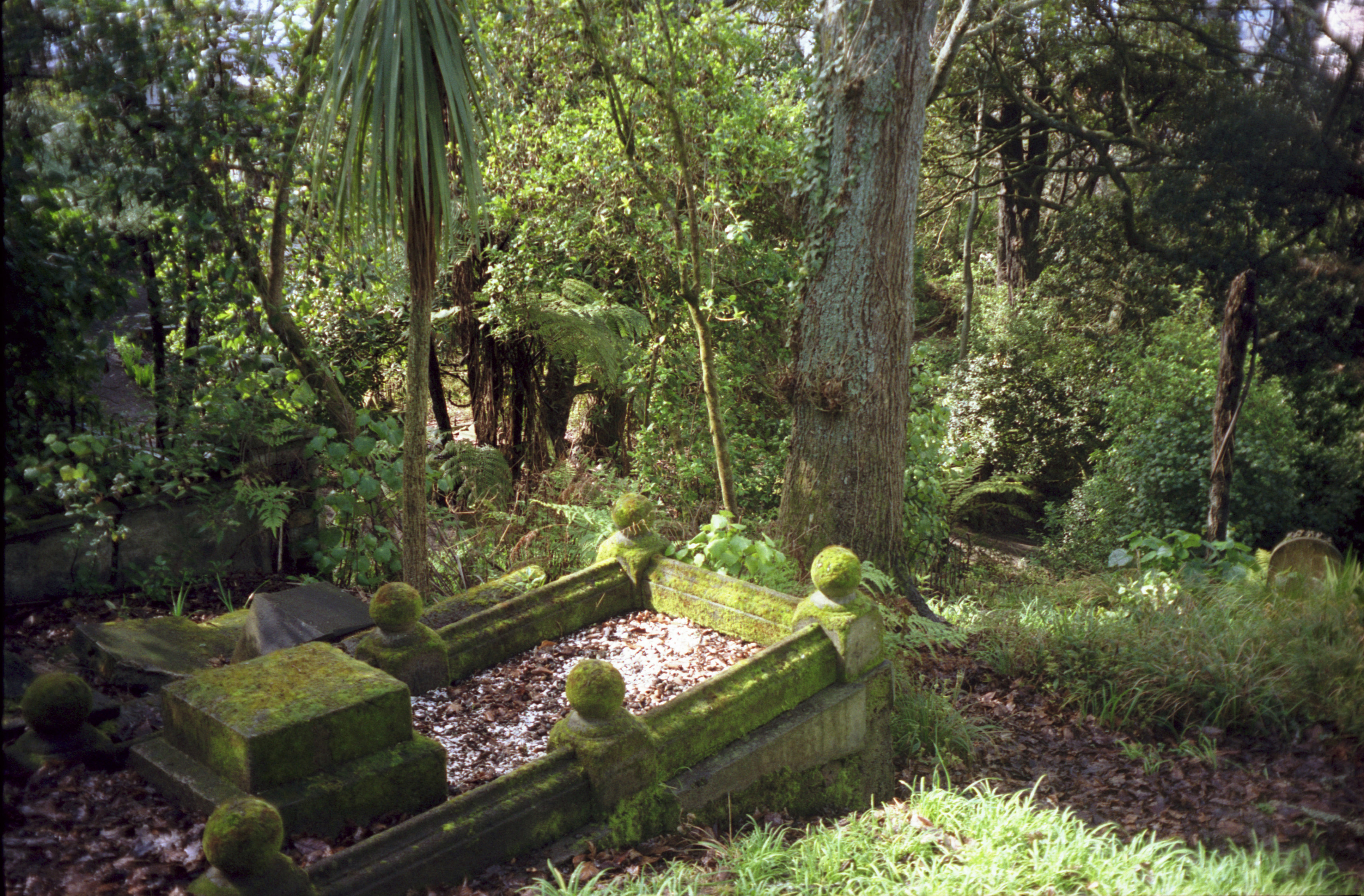 Symonds Street Cemetery